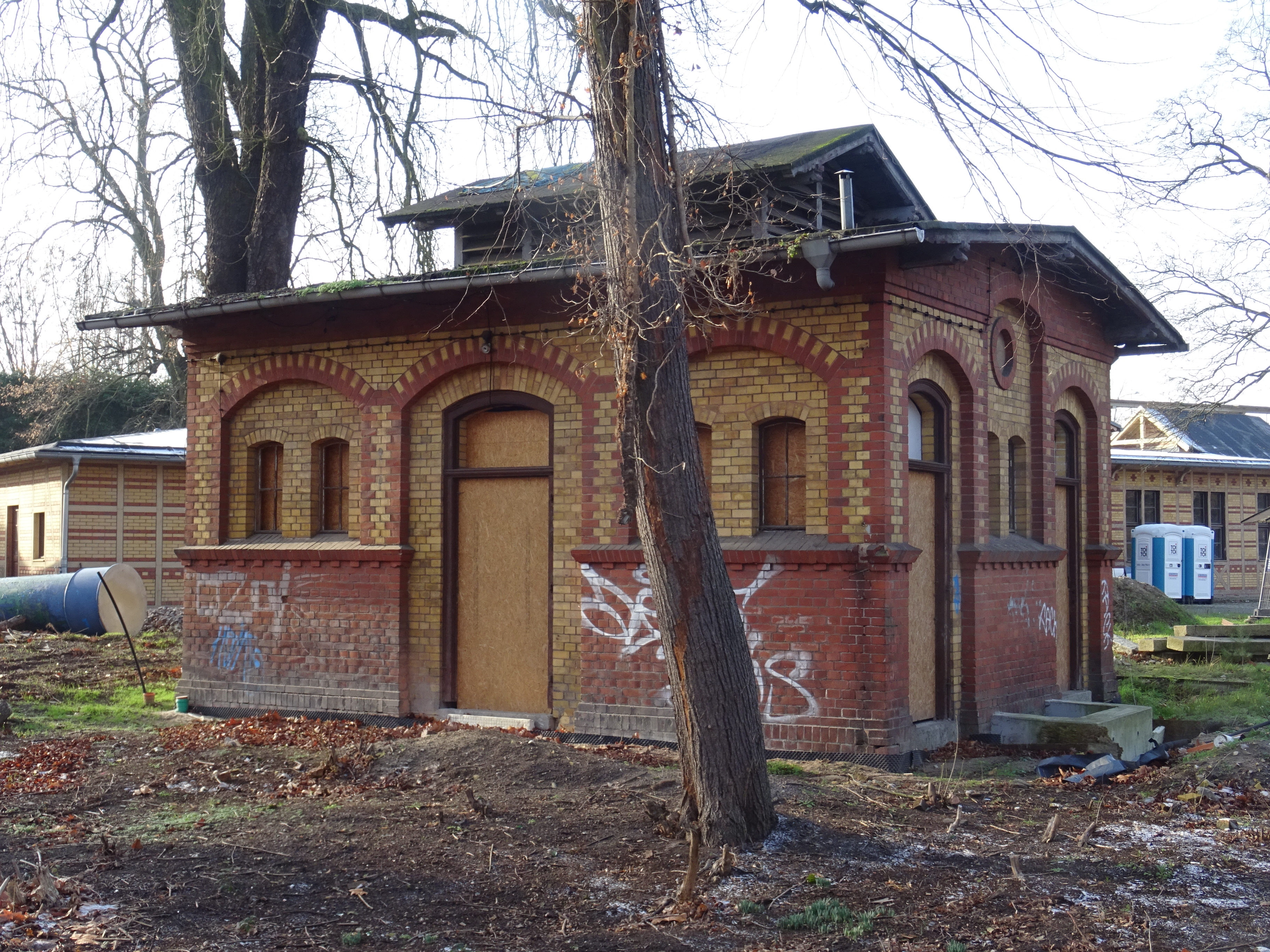 Bahnhof Potsdam Park Sanssouci, denkmalgeschütztes Toilettenhäuschen